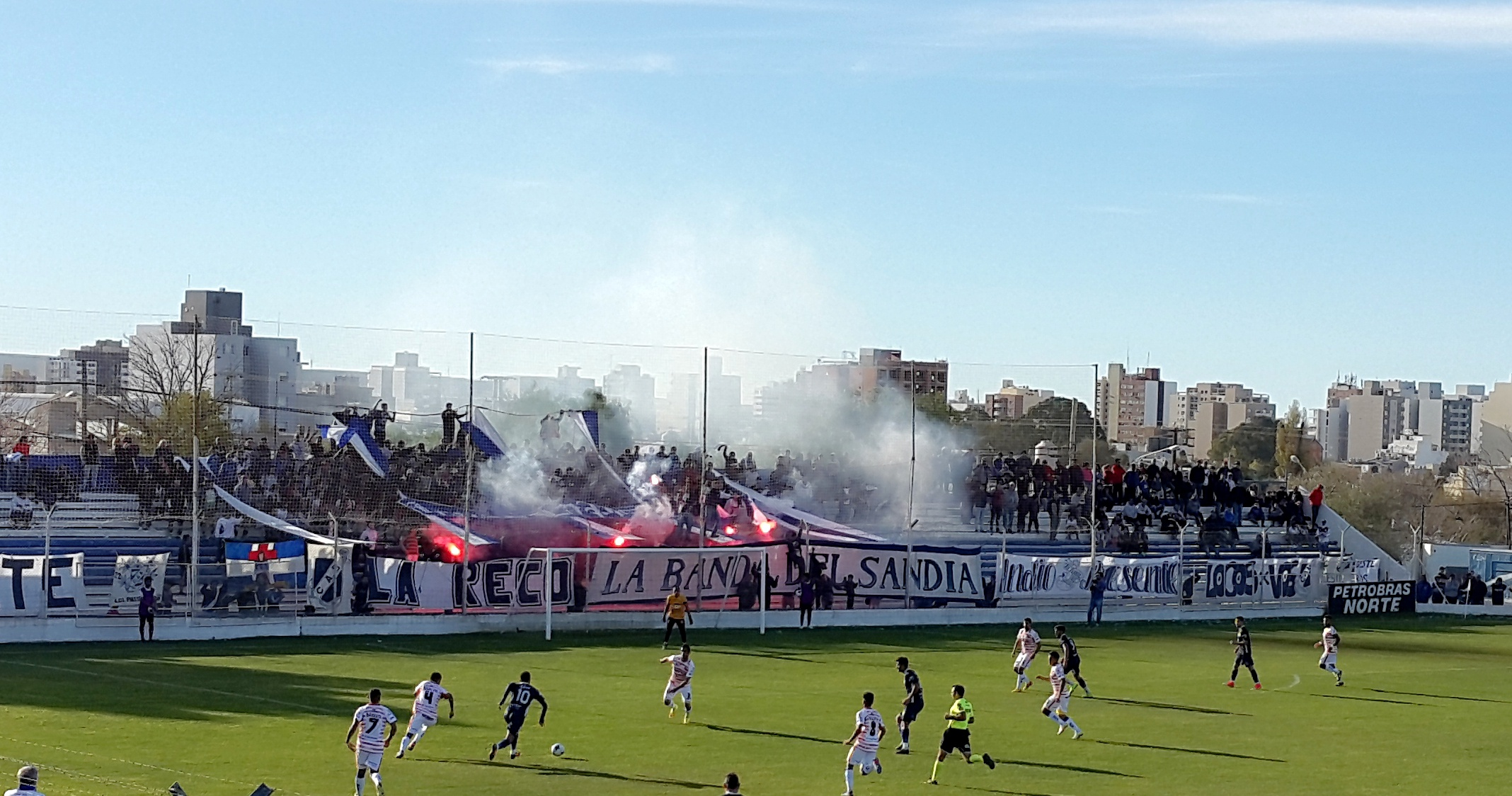 Estadio del club Guillermo Brown de Puerto Madryn "Raúl Conti"